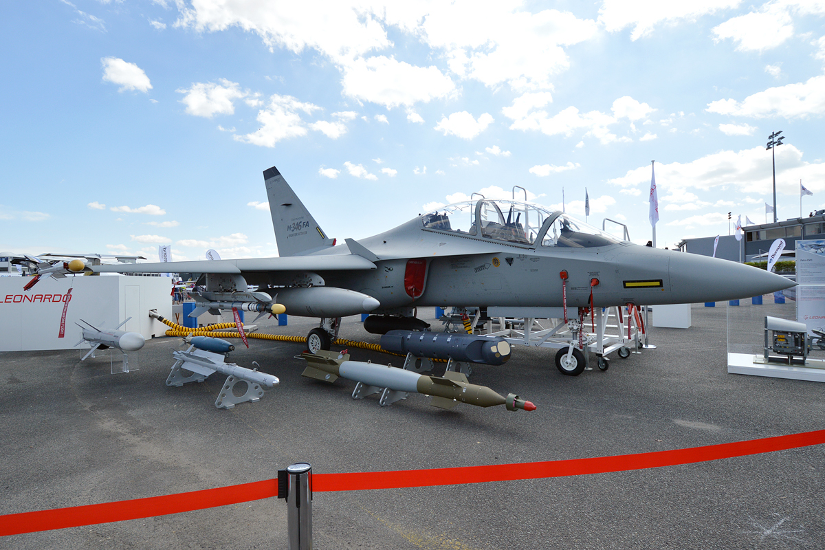 Leonardo, M-346FA